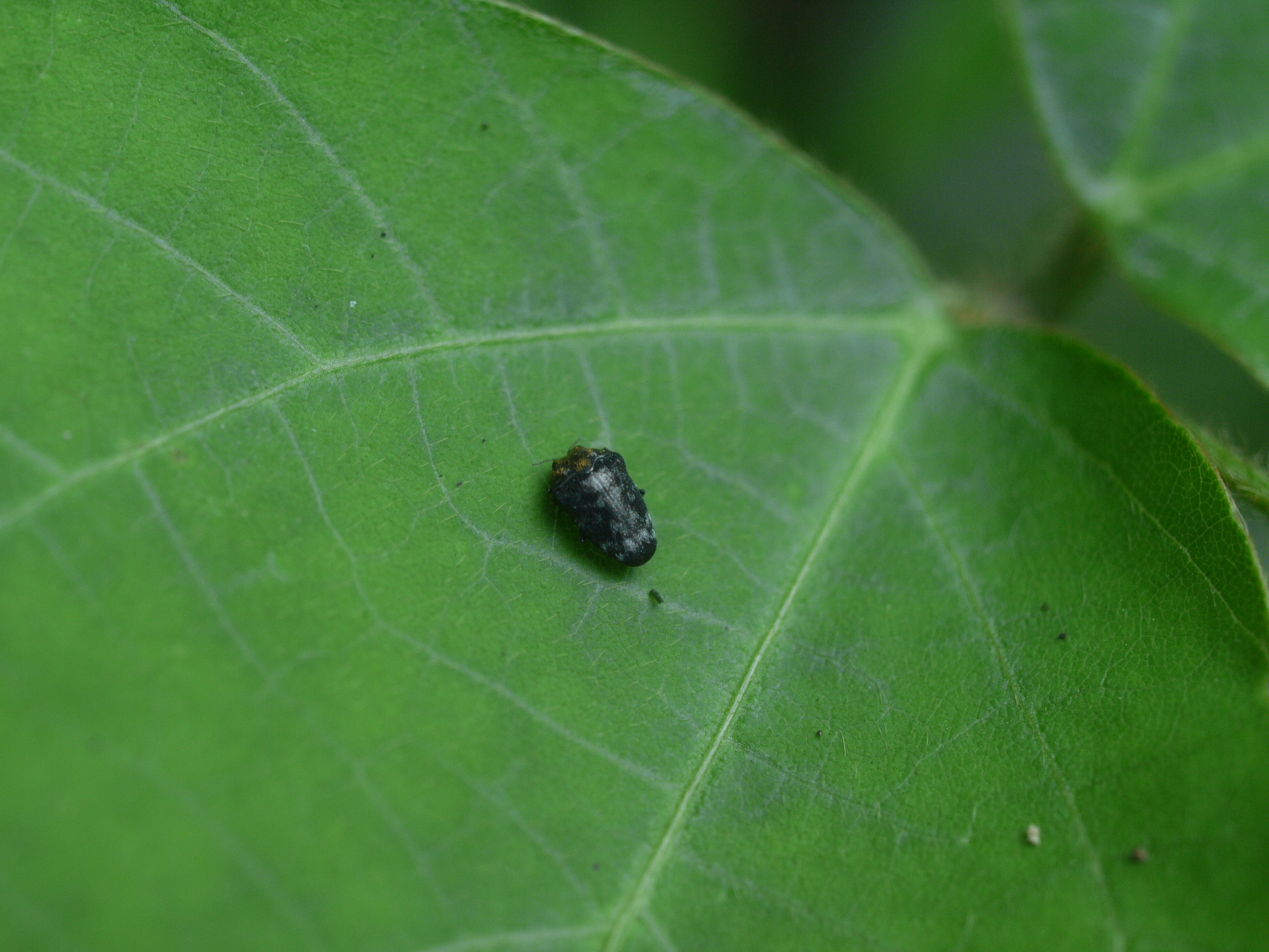 Trachys auricollis(クズノチビタマムシ)